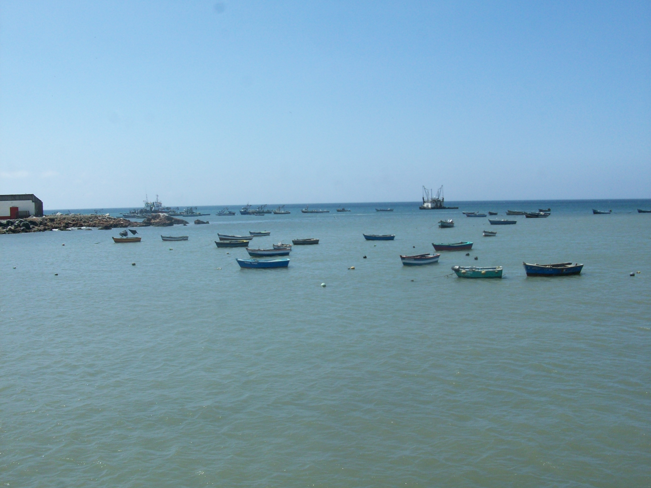 Aguas serenas en Puerto Huarmey, Ancash, Perú